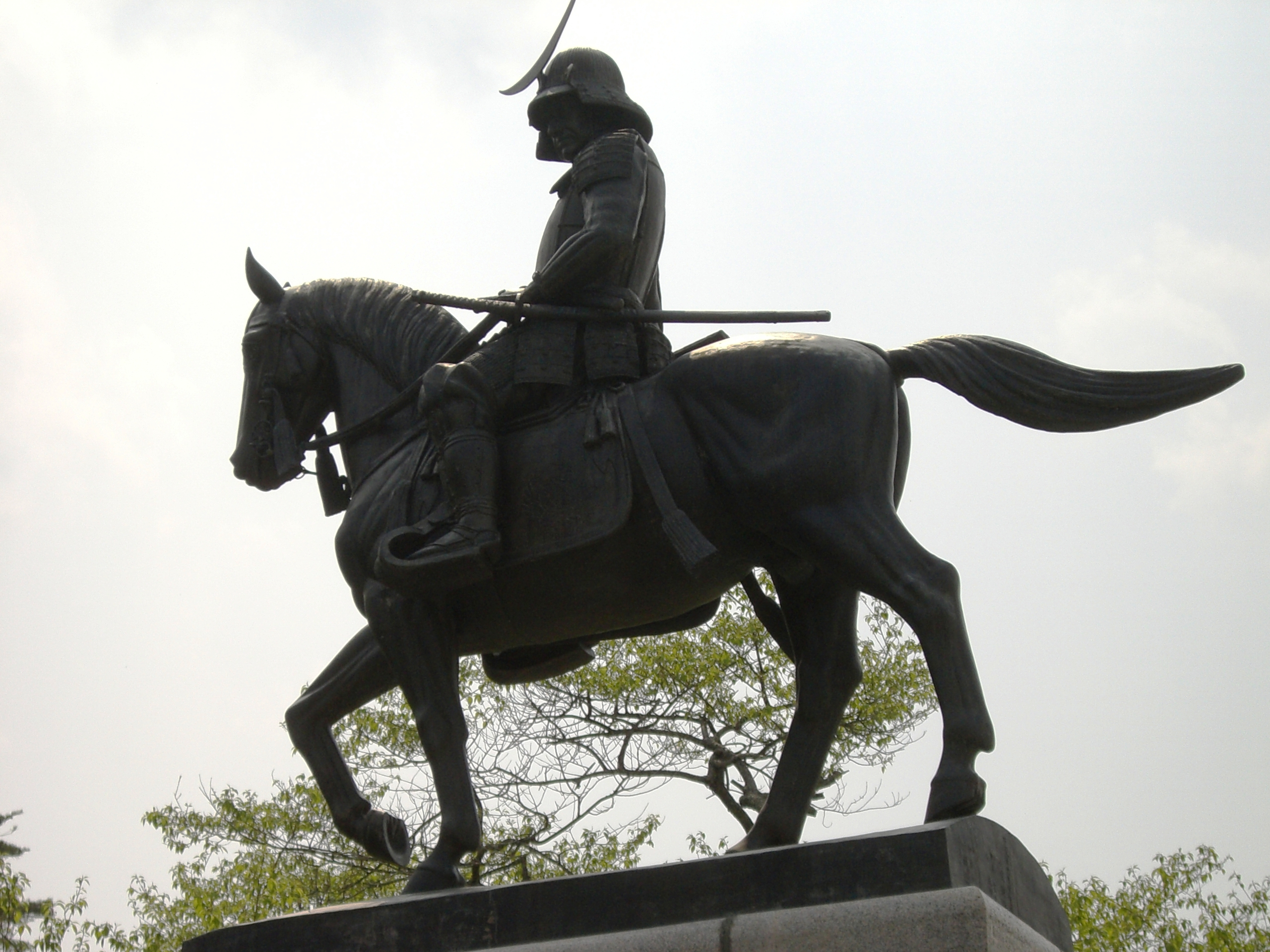 青葉城の伊達政宗像。 Aobajyo's Date Masamune statue.